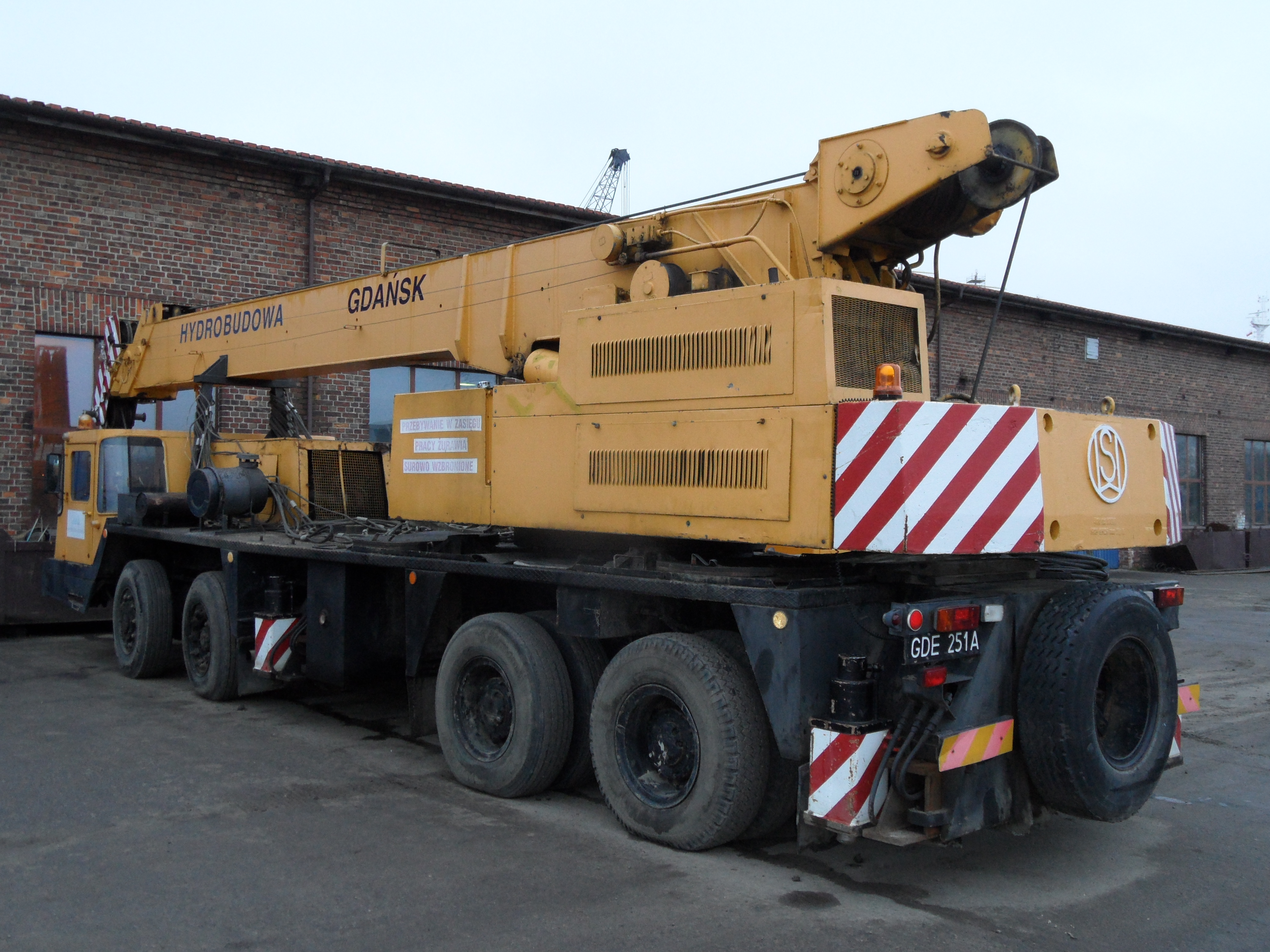 Dźwig samochodowy Hydros T351 Stalowa Wola